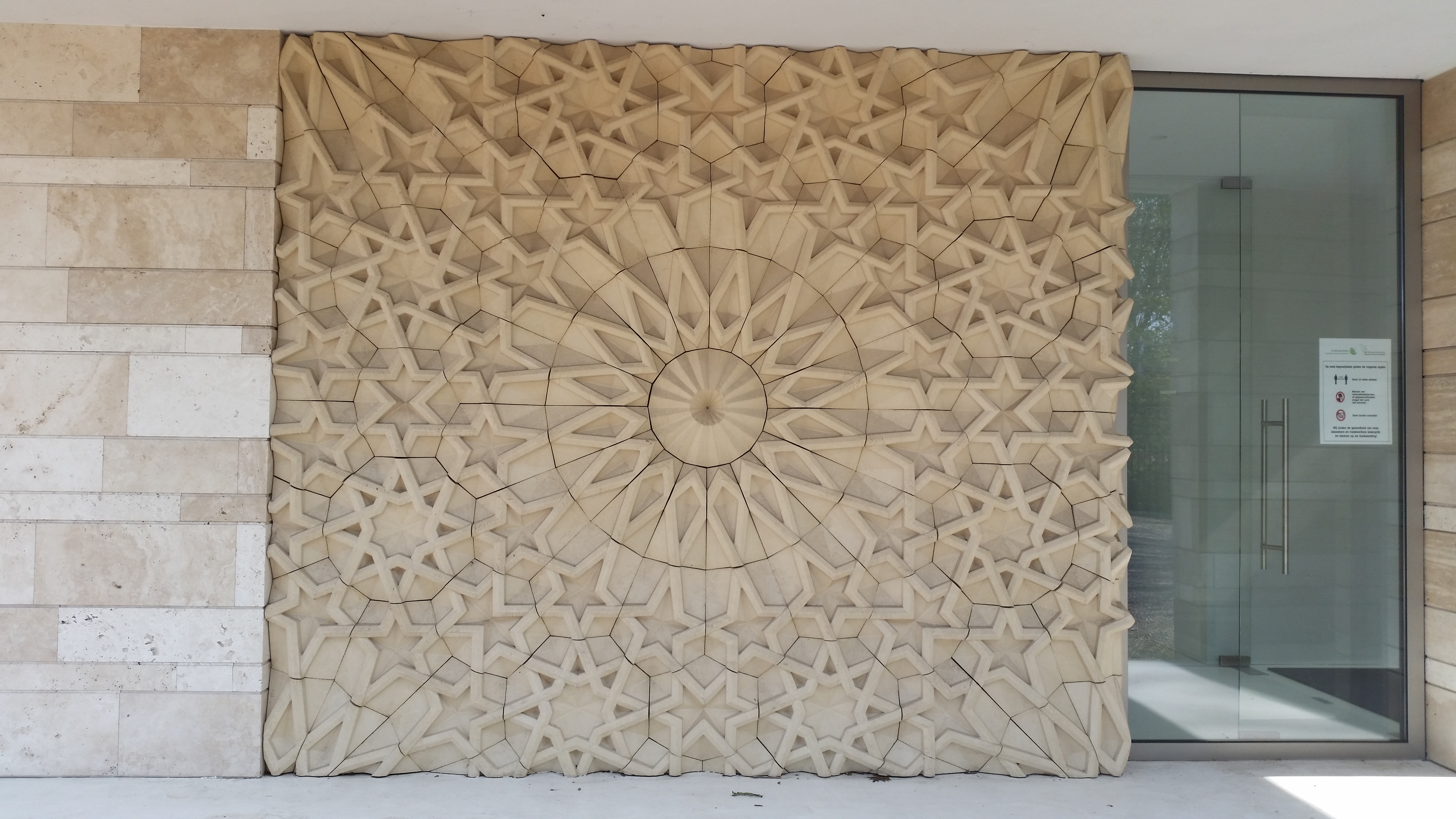 Impressie Islamitisch uitvaartcentrum, De Nieuwe Ooster